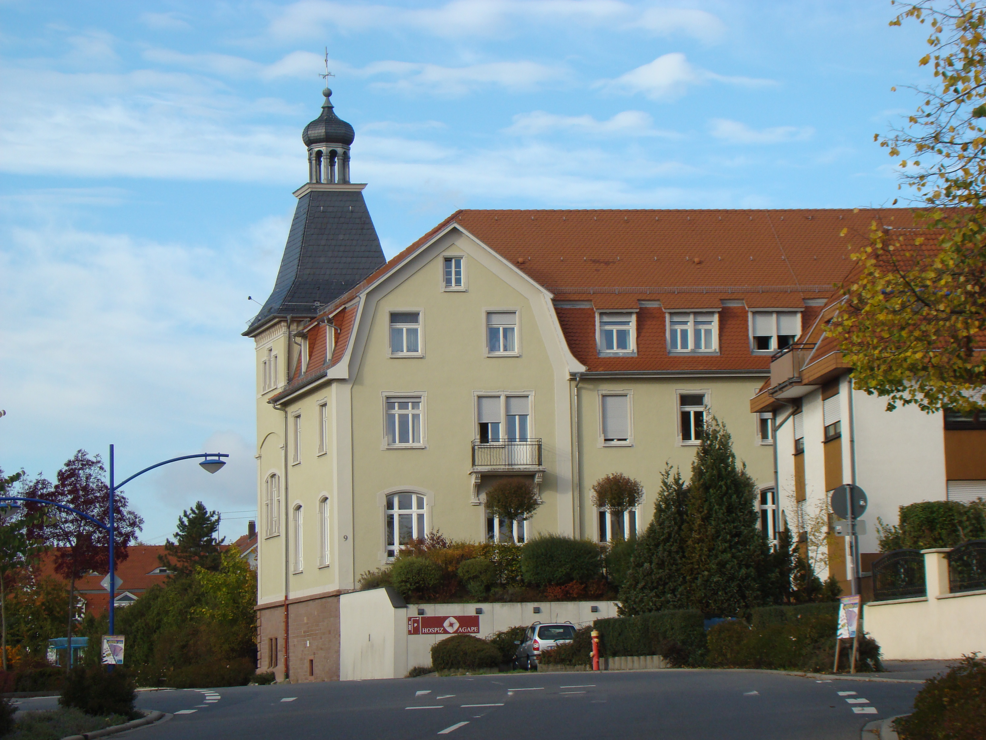 Hospiz Agape in Wiesloch (ehem. Gasthaus Bierkeller)